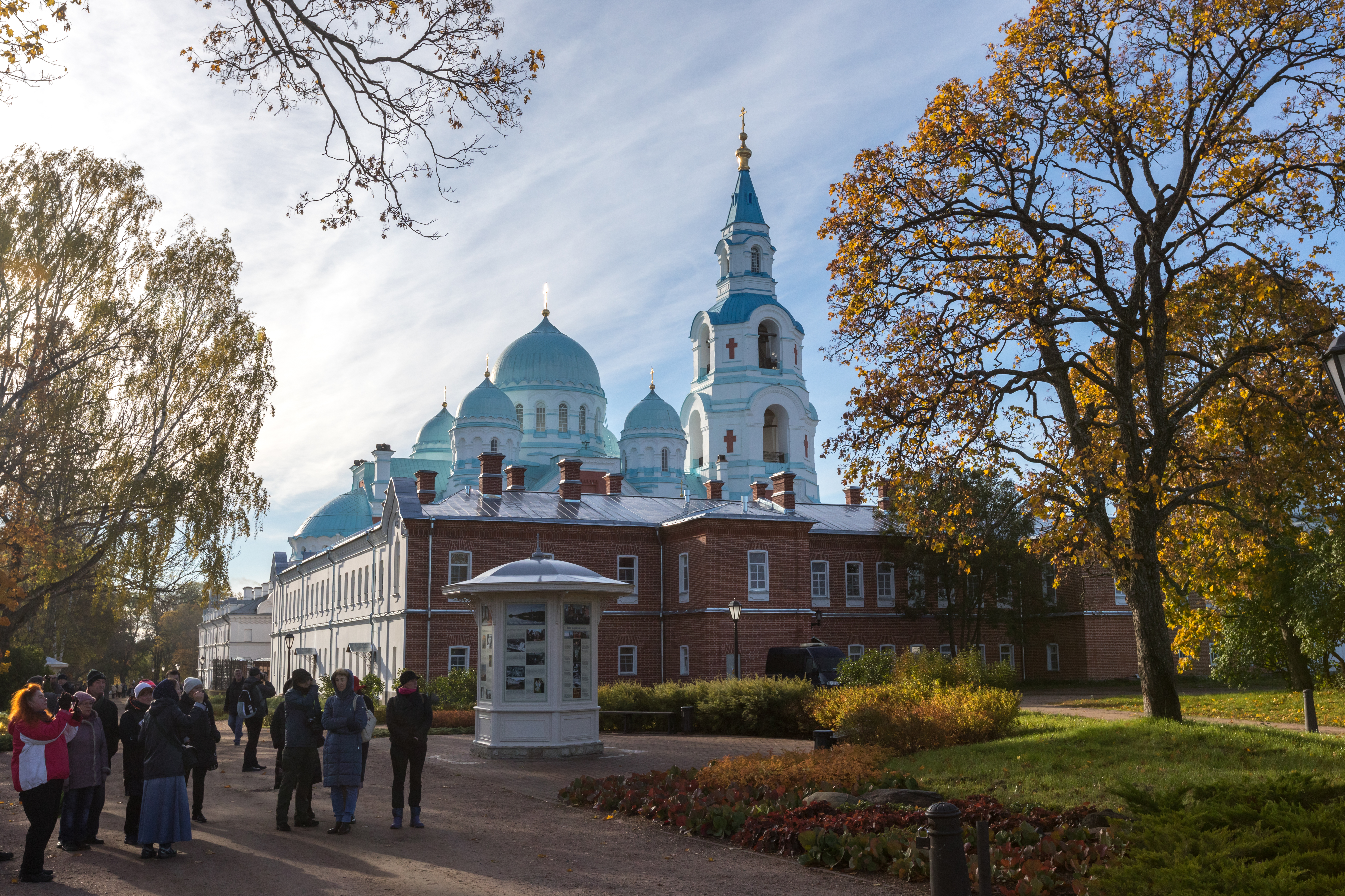 Монастырь Спасо-Преображенский Валаамский ставропигиальный. Ансамбль центральной усадьбы: остров Валаам, Сортавальское г.п., Карелия